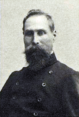 Михаил Иванович Канашев (2 июля 1864, Оренбургская губерния — после 1917) — вахмистр, атаман, депутат IV Государственной думы от Оренбургской губернии (1912—1917).